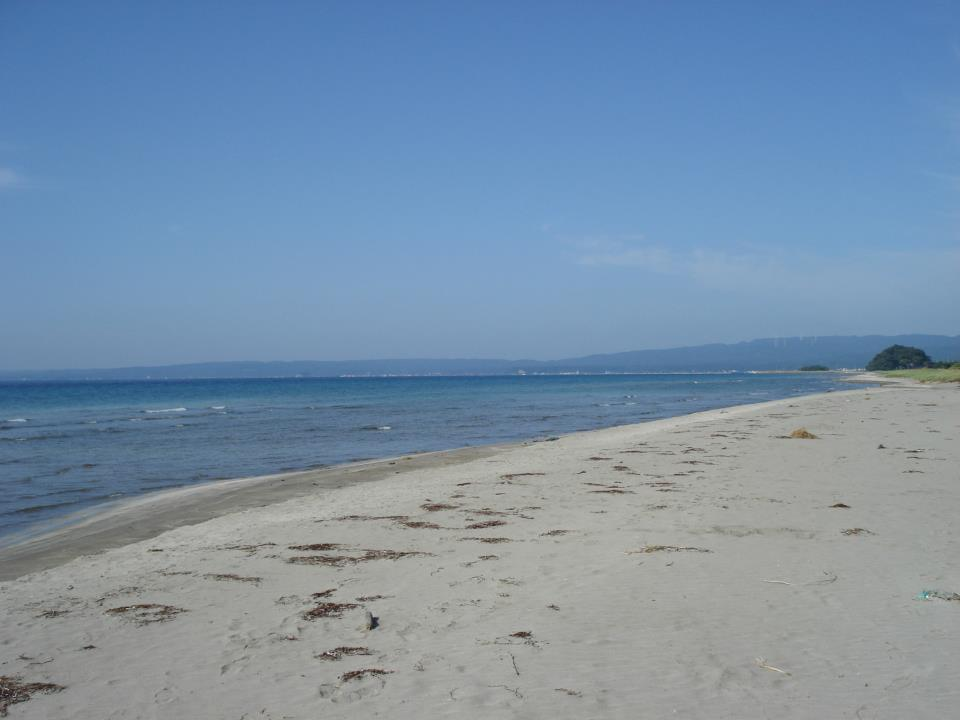 日本の渚百選 鉢が崎海岸